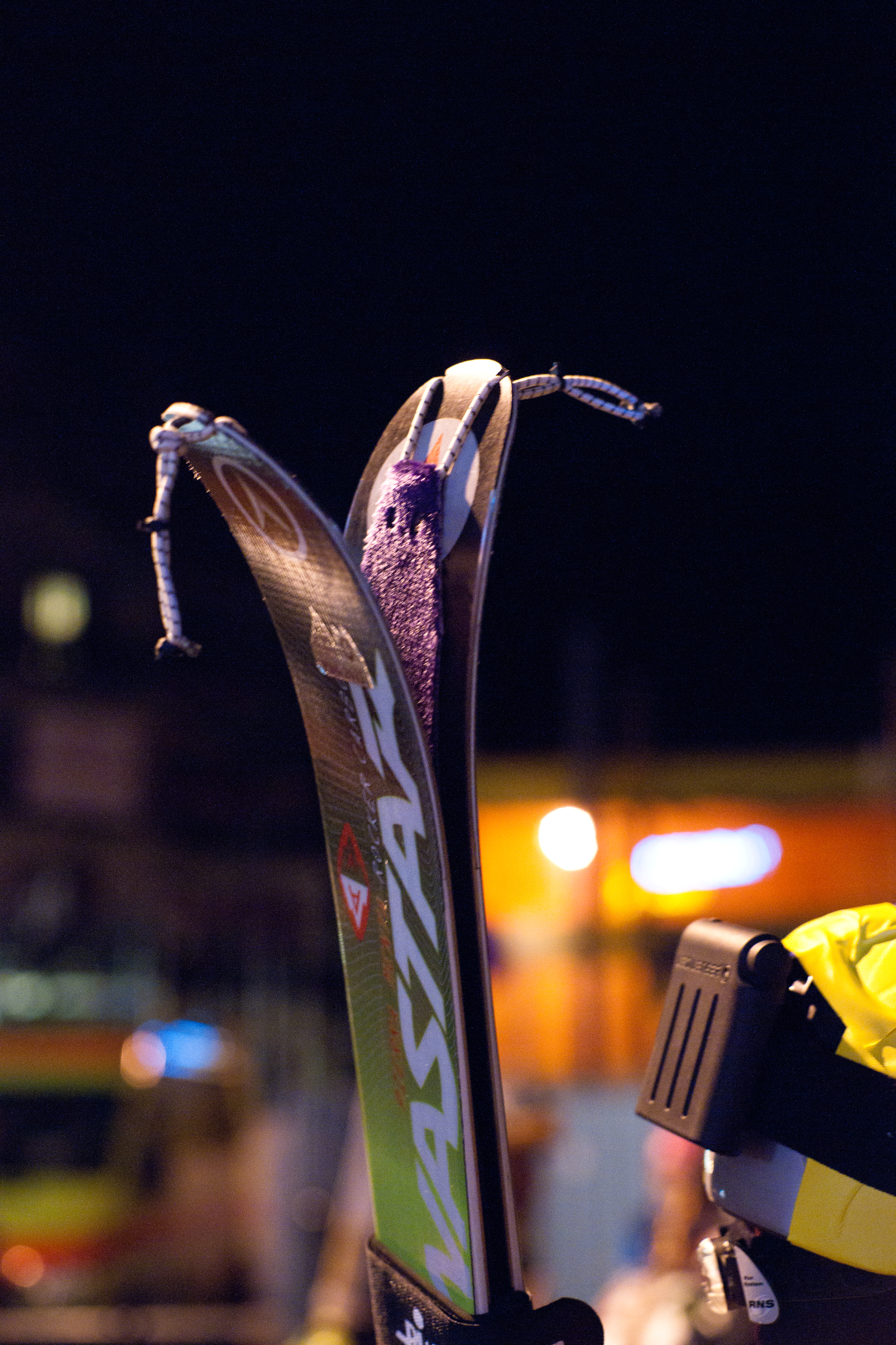 Peau de phoque - pdg 2012